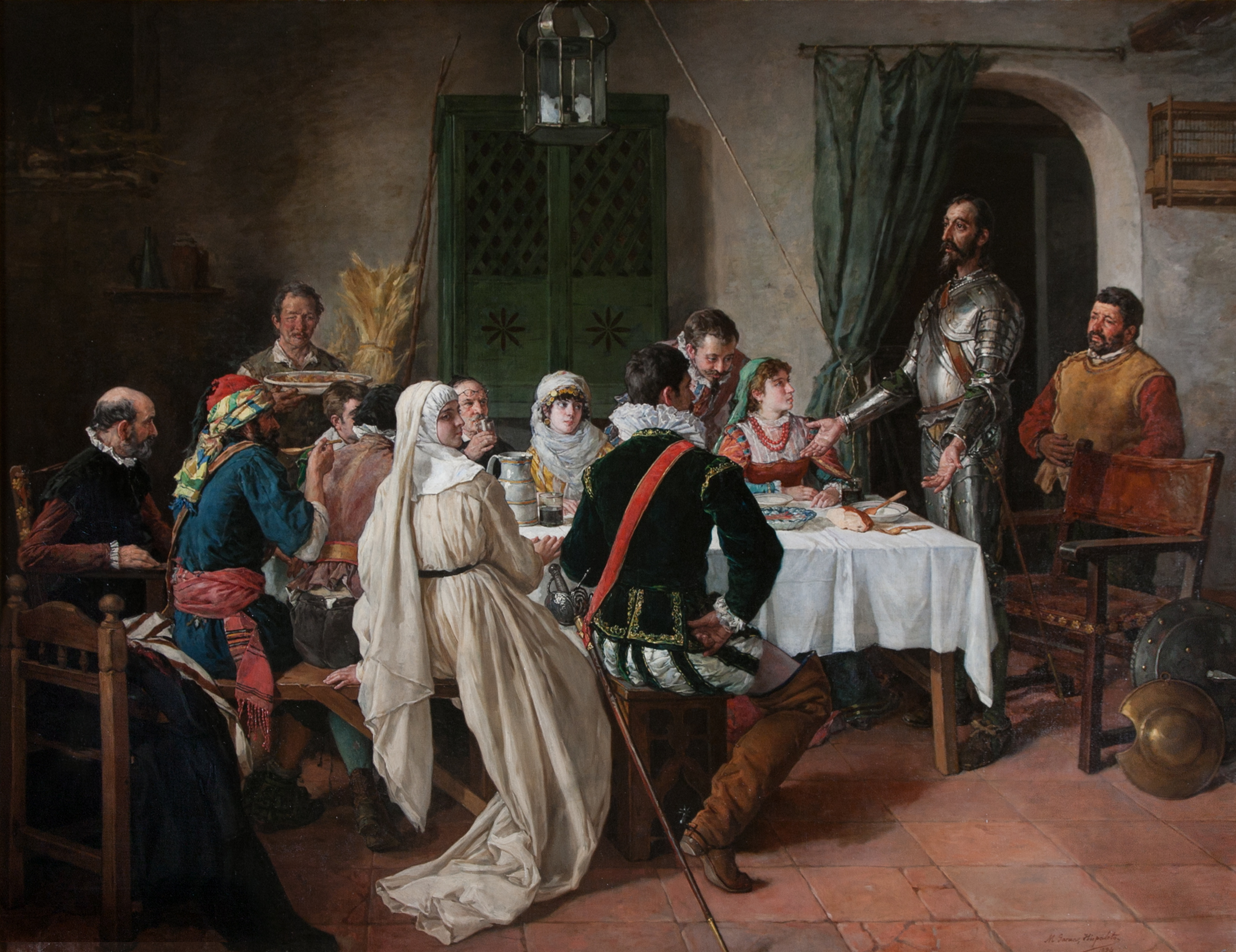 El lienzo representa el discurso que hizo don Quijote de la Mancha sobre las armas y las letras (cap. XXXVIII).